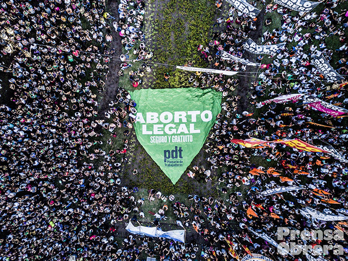 Símbolo de la Campaña Nacional por el Aborto Legal, Seguro y Gratuito en la marcha del 8 de marzo de 2018 en Buenos Aires, Argentina